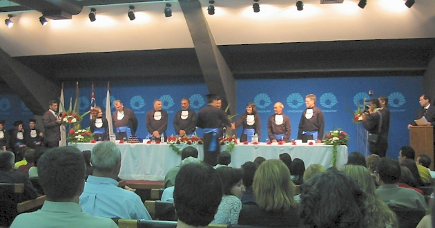 Colação de Grau do Instituto de Química - Upload feito pelo autor